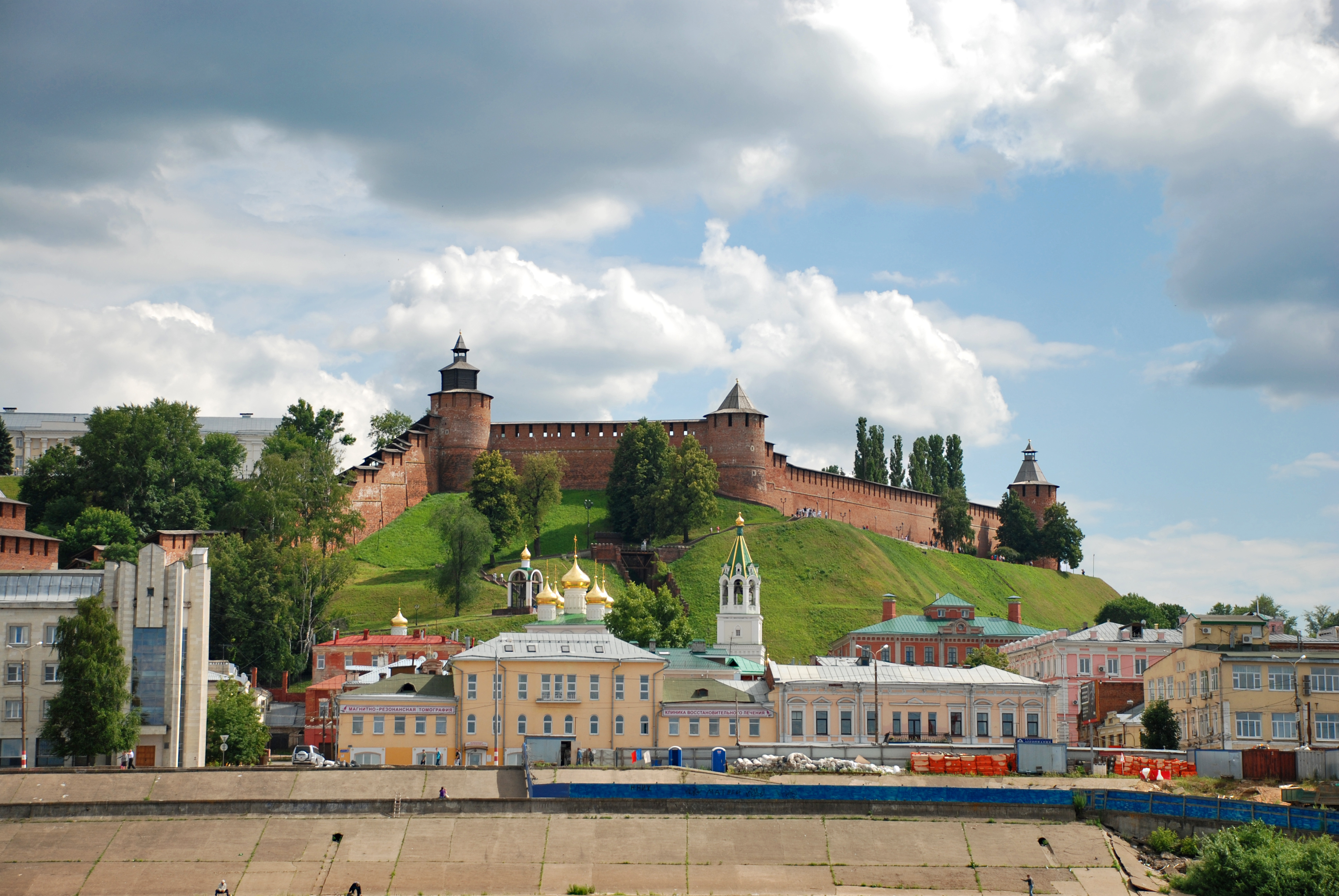 Стены (Нижегородская область, Нижний Новгород, Кремль, Минина и Пожарского площадь)